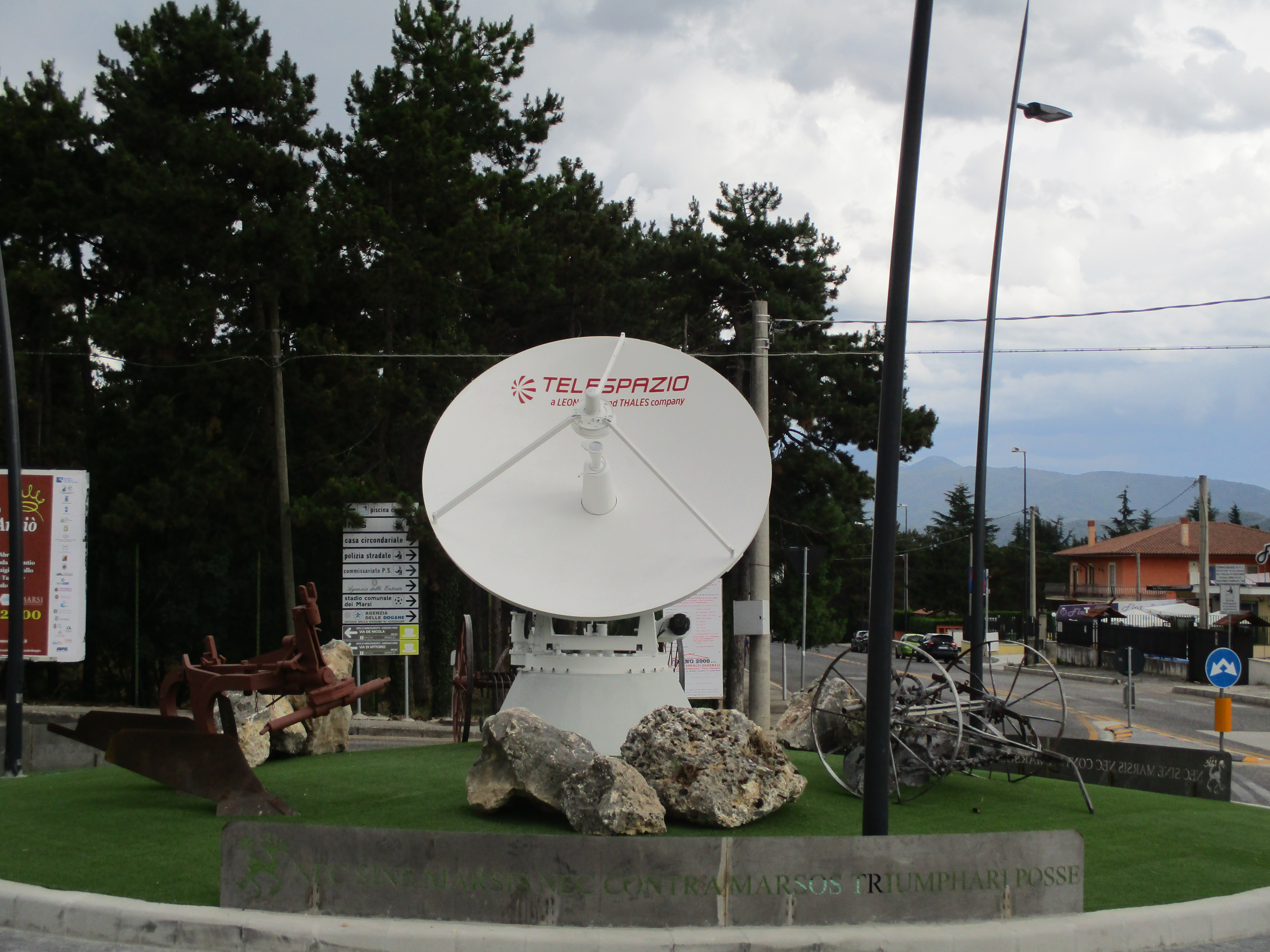 Rotonda di borgo Pineta realizzata con un'antenna in disuso di Telespazio